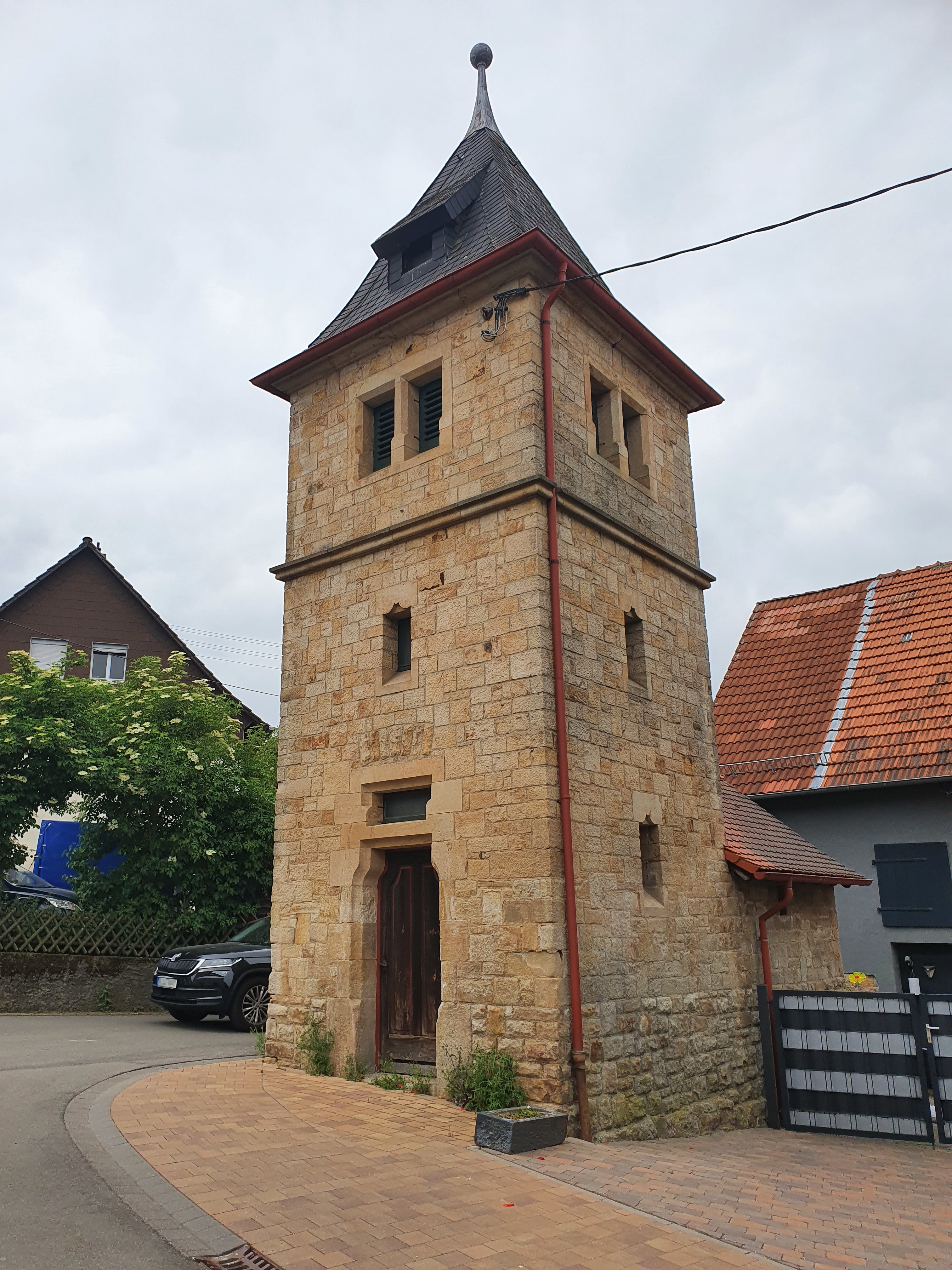 gotisierender Sandsteinquaderbau mit Pyramidendach, 1911, Architekt wohl Peter Arnold, Rockenhausen